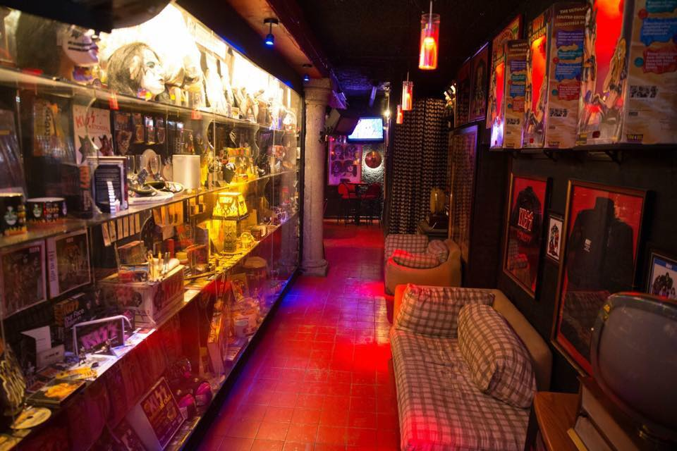 Pasillo de entrada al museo-bar